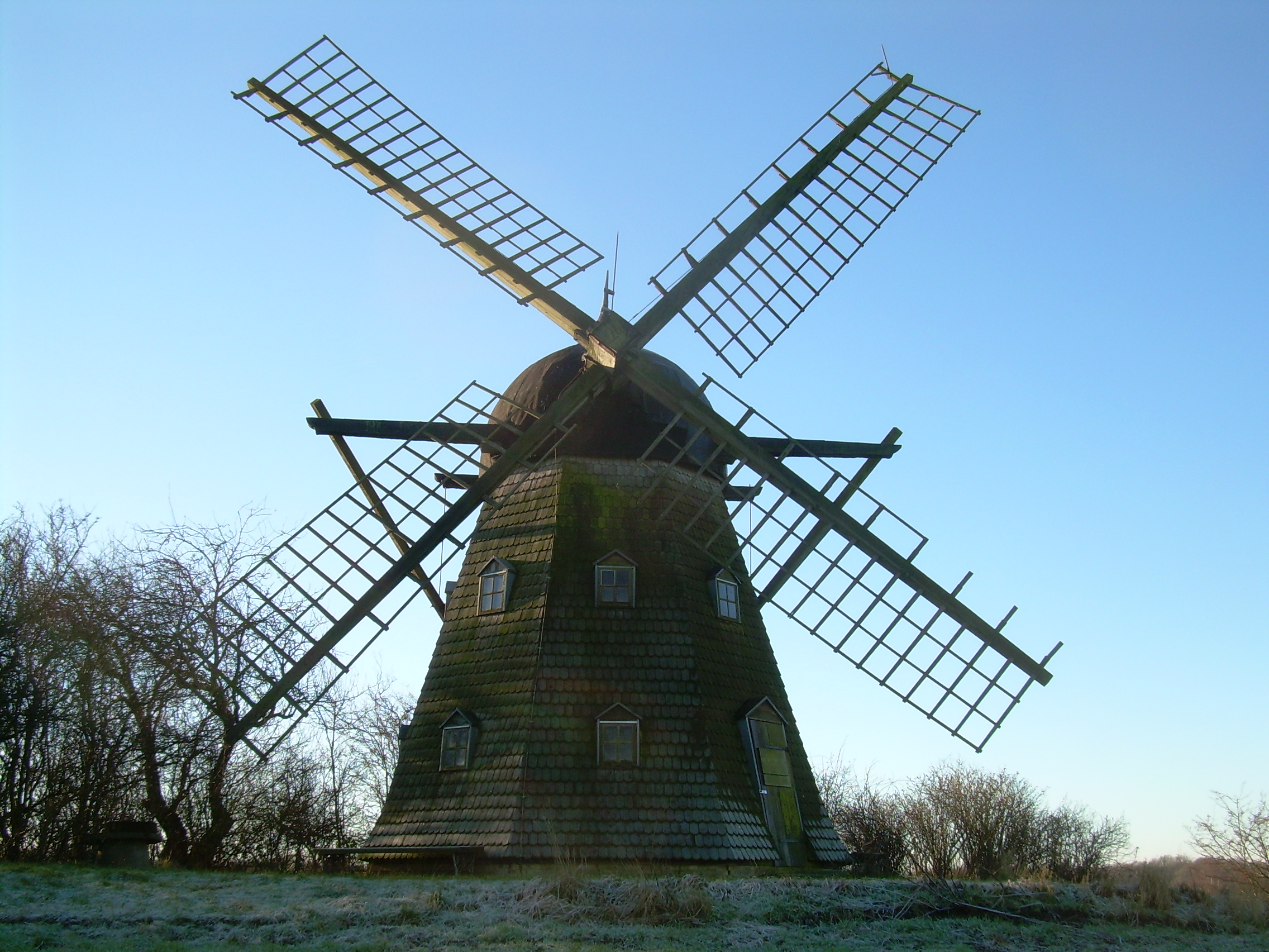 Dorthebjerg mølle